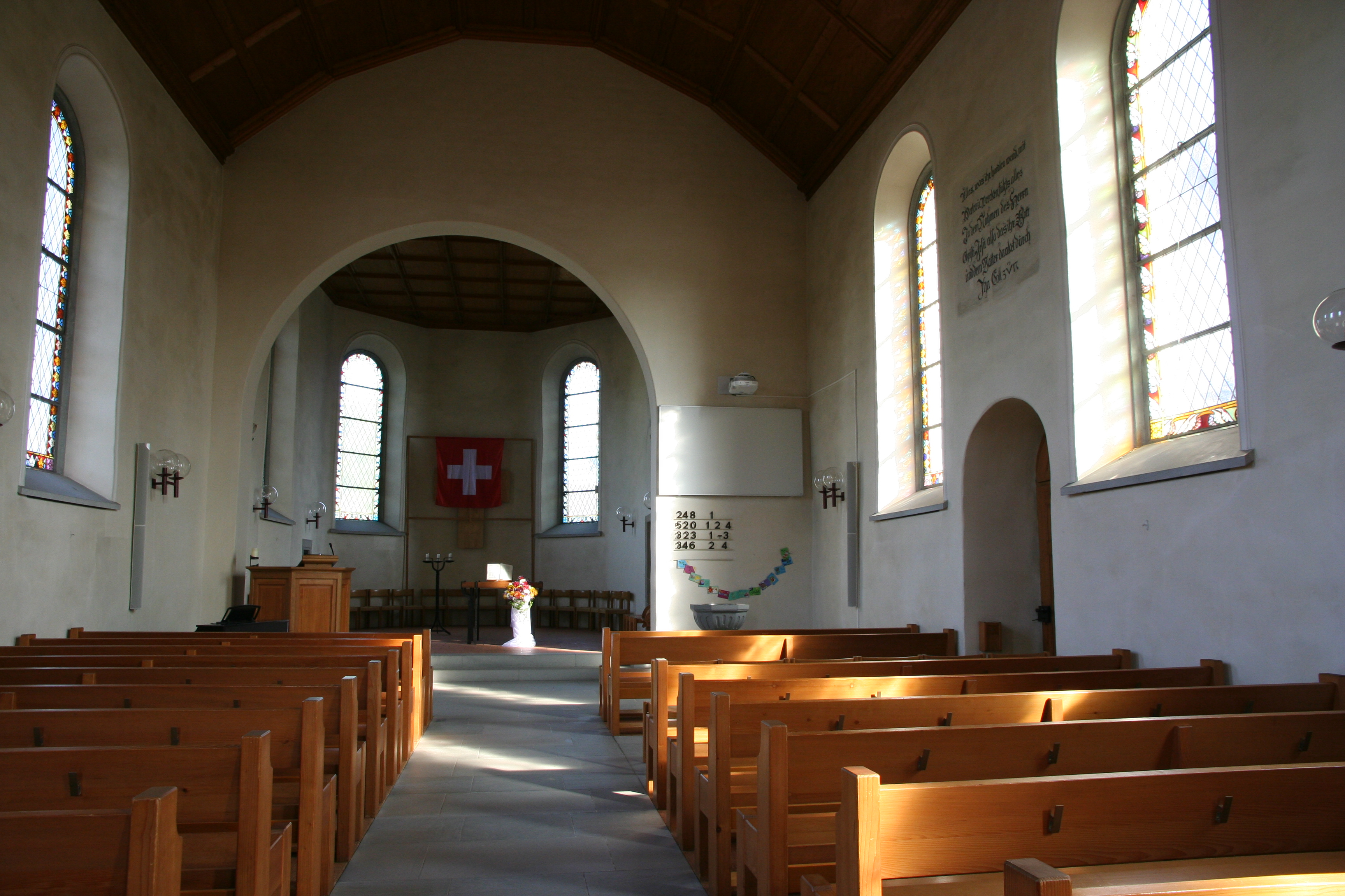 Evangelische Kirche St. Verena Müllheim TG